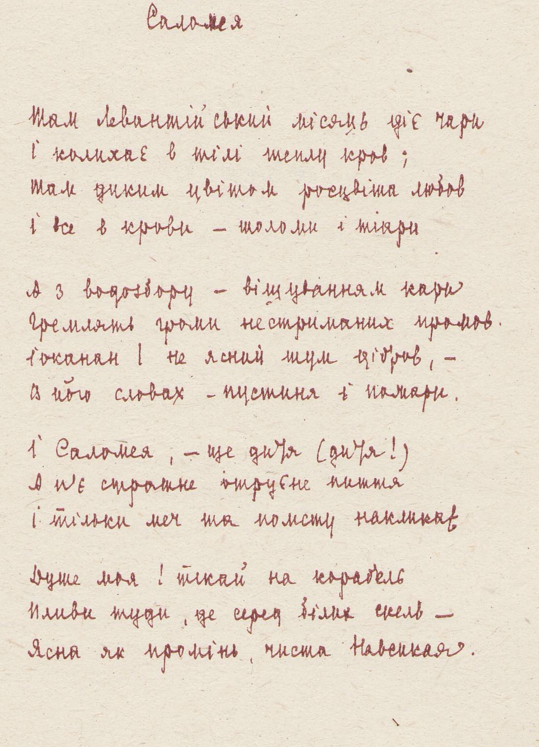 Zerov Salomeja1: автограф сонету М. Зерова Саломея